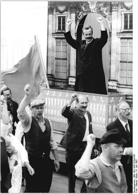 ADN-ZB Oberst 4.7.87 Berlin: Jubiläum-Festumzug. Innerhalb des großen Festumzuges durch das Stadtzentrum anläßlich des 750jährigen Stadtjubiläums wurde die Szene dargestellt, in der Karl Liebknecht am 9. November 1918 vom Balkon des Schlosses die sozialistische deutsche Republik ausgerufen hatte.